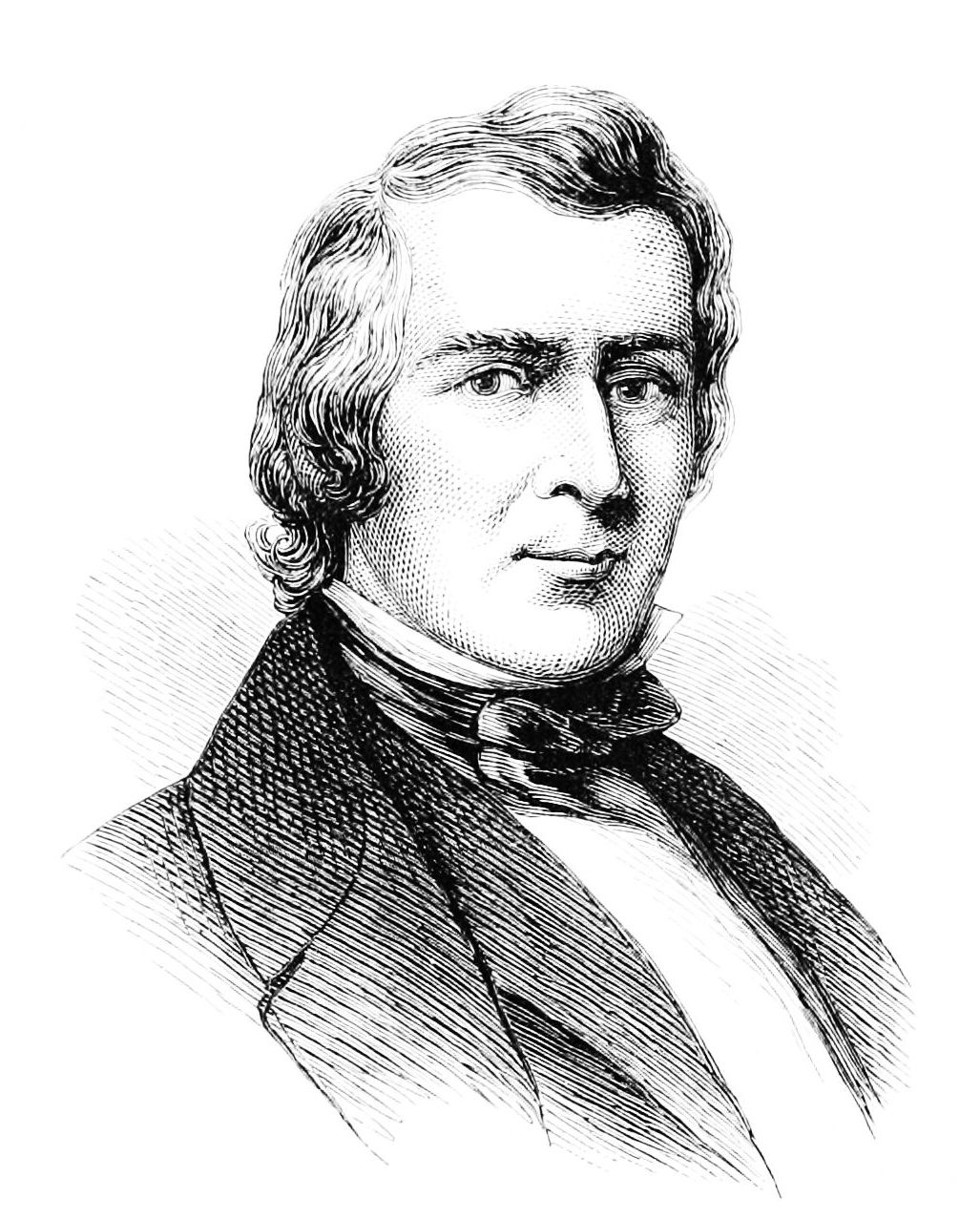 Robert L Stevens